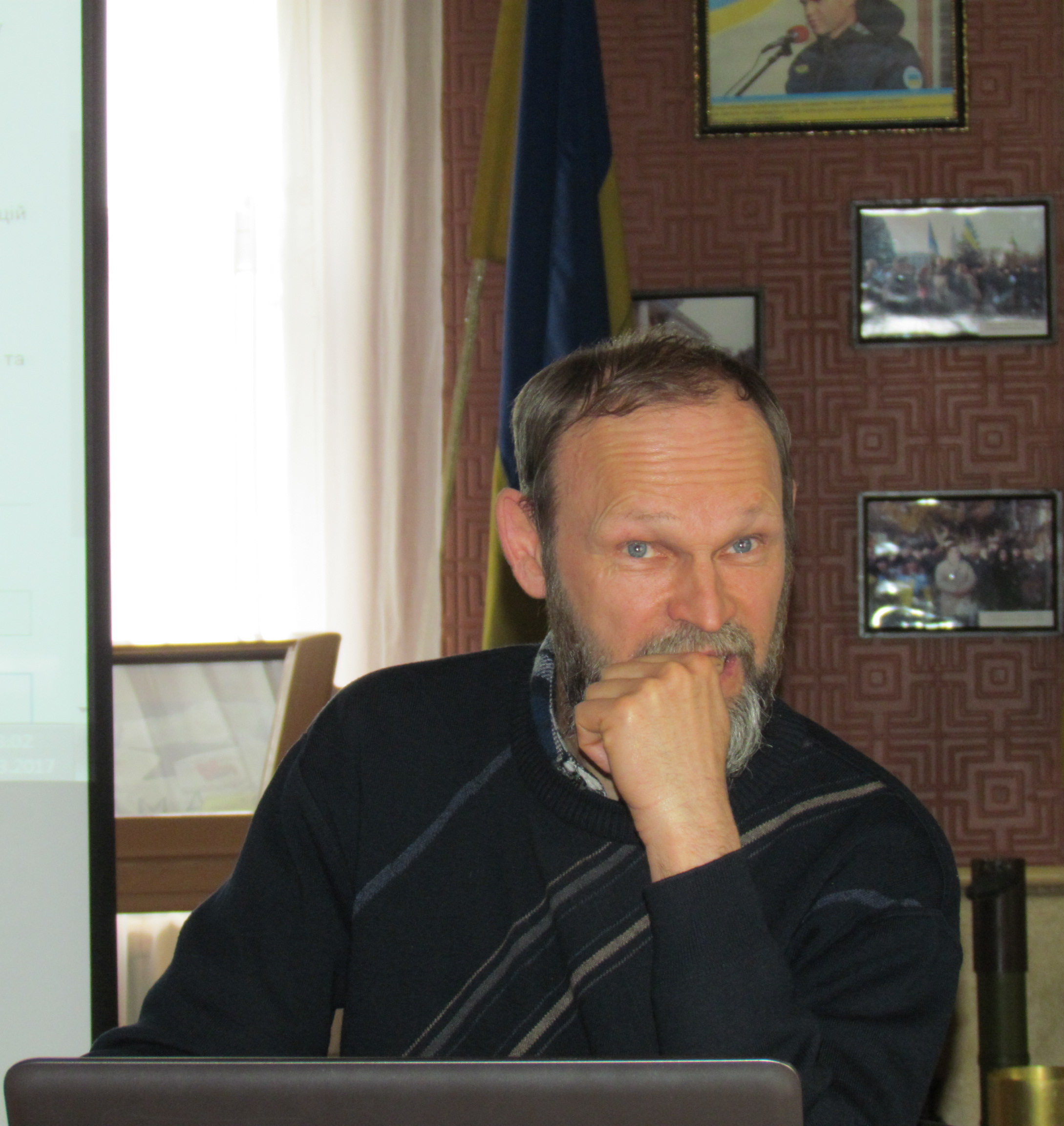 Олександр Колибенко, український історик і археолог